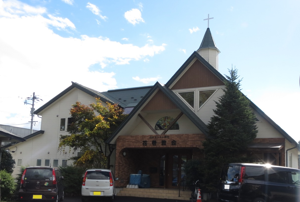 日本キリスト教団花巻教会